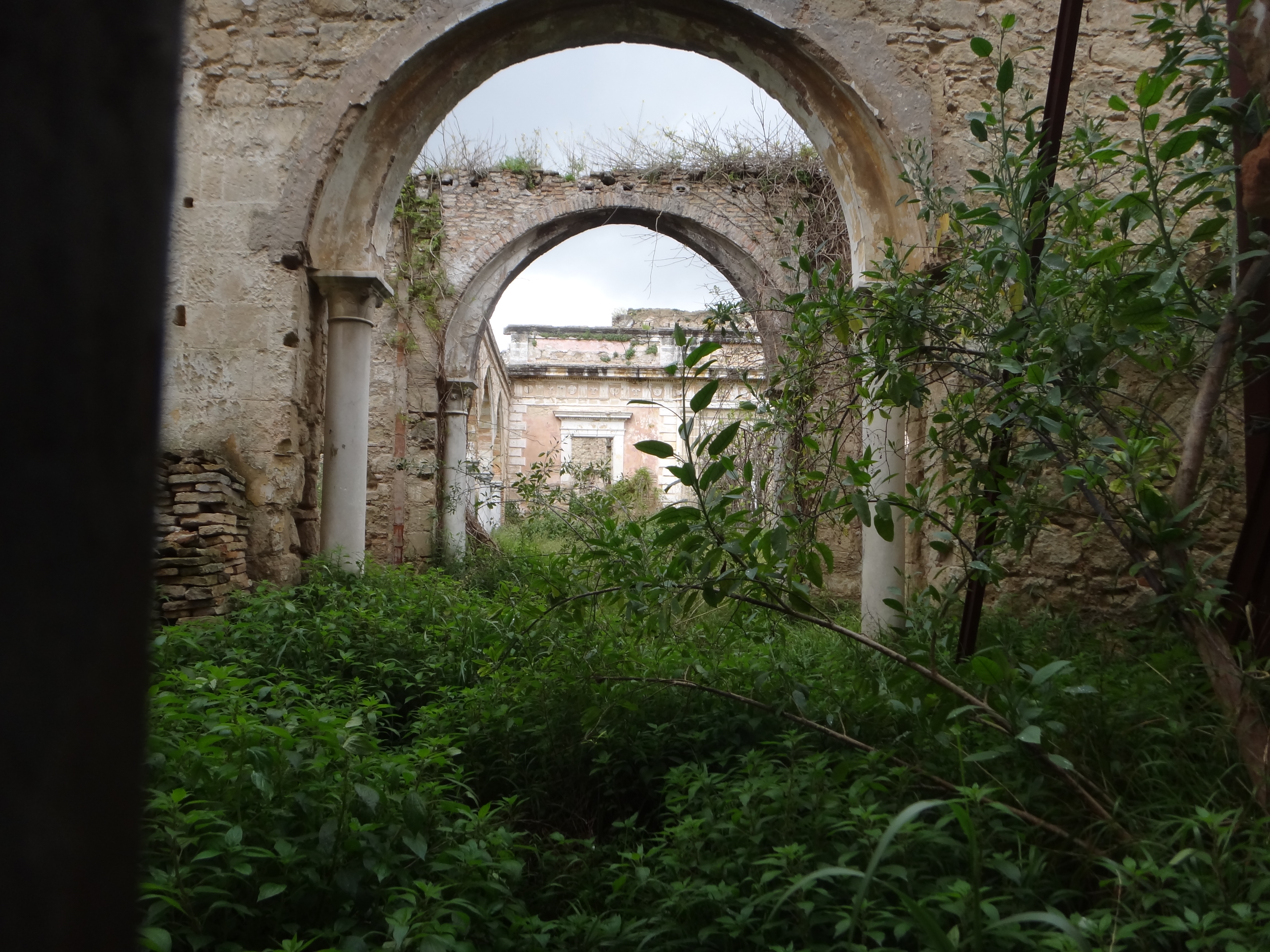 Palacio de Riquelme, Jerez de la Frontera (Andalucía, España)